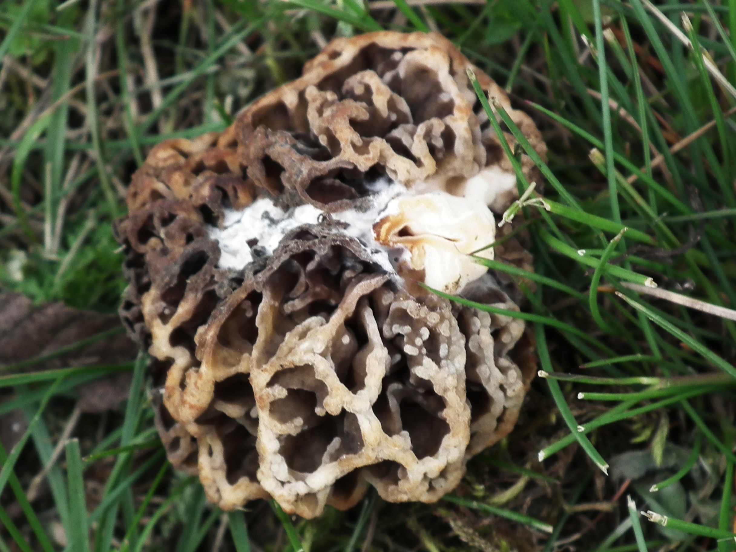 Smardze na poznańskim hipodromie na Woli.